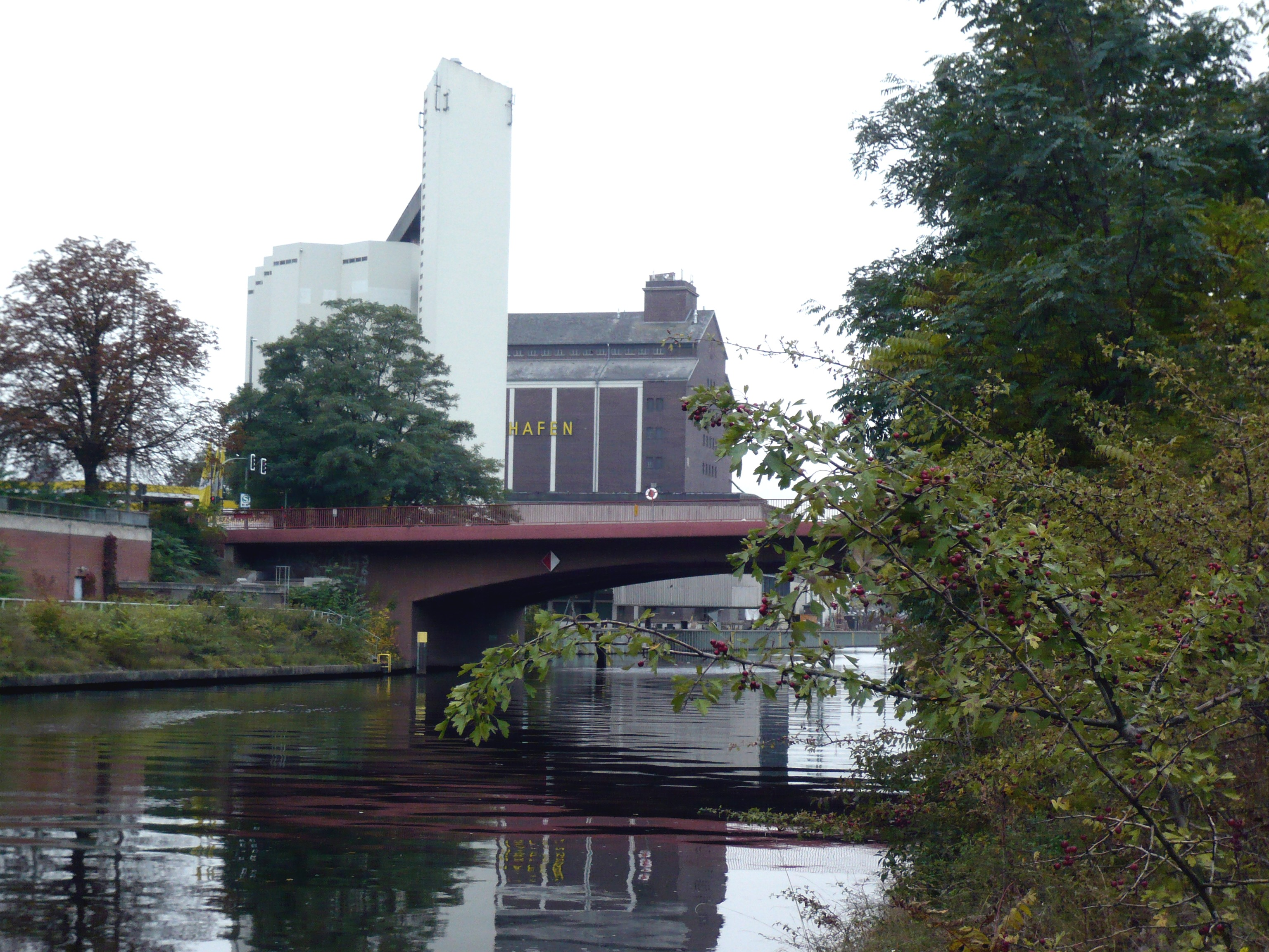 Ortsteil Berlin-Wedding/ Föhrer Brücke über den B.-Spandauer-Schifffahrtskanal